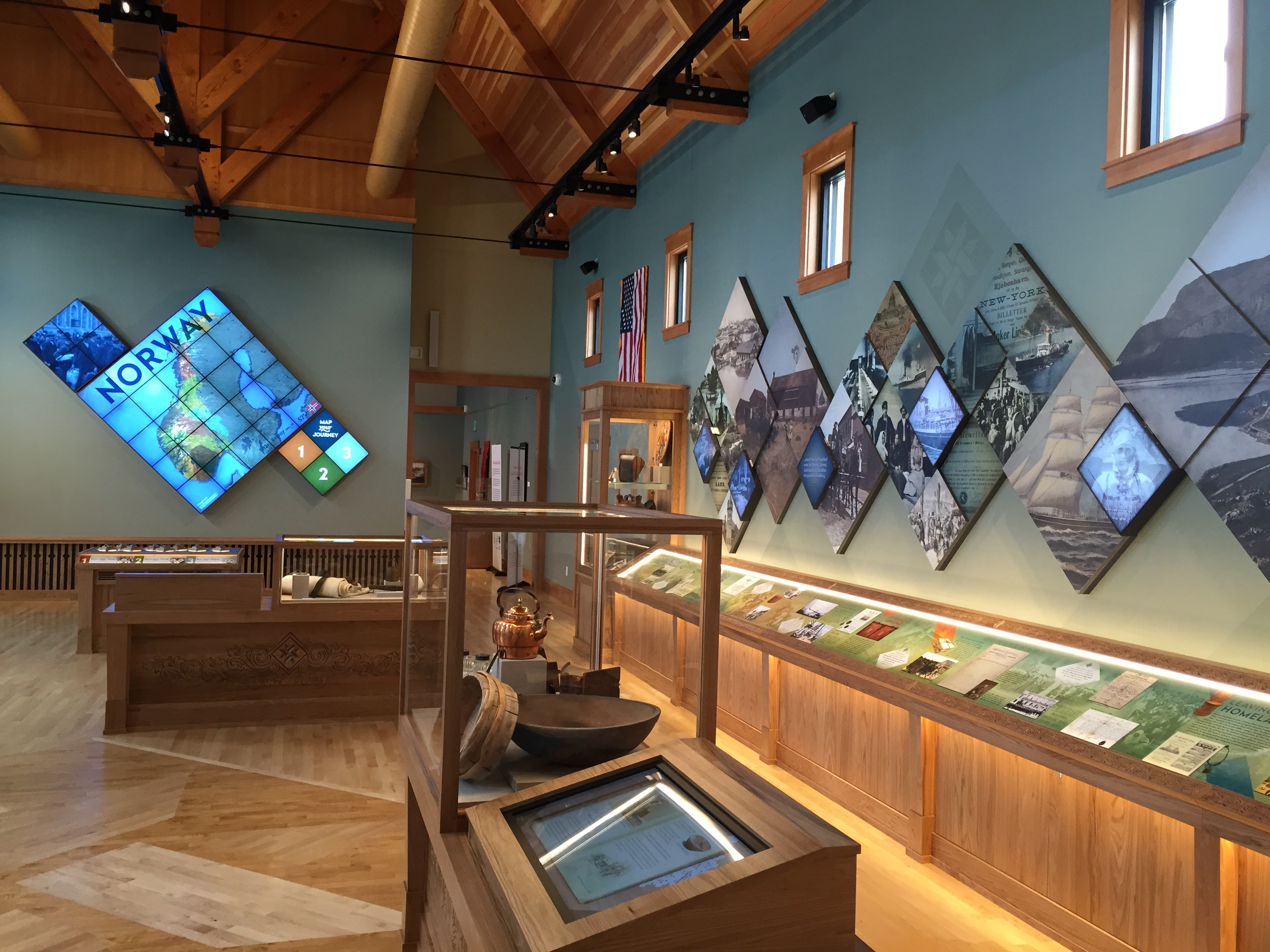 Utstillingshallen i Livsreise-senteret, Stoughton